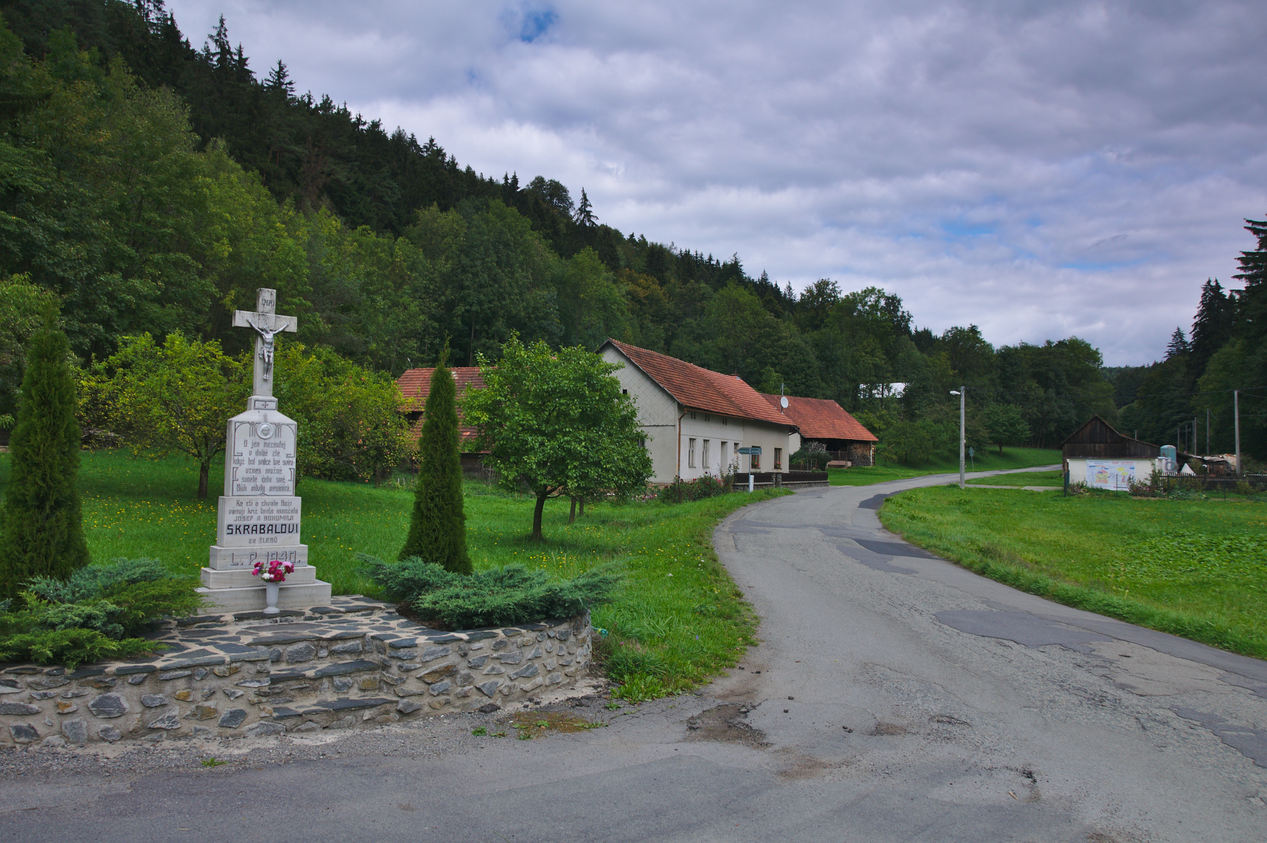 Kříž na rozcestí, Žleby, Strhaře, okres Brno-venkov